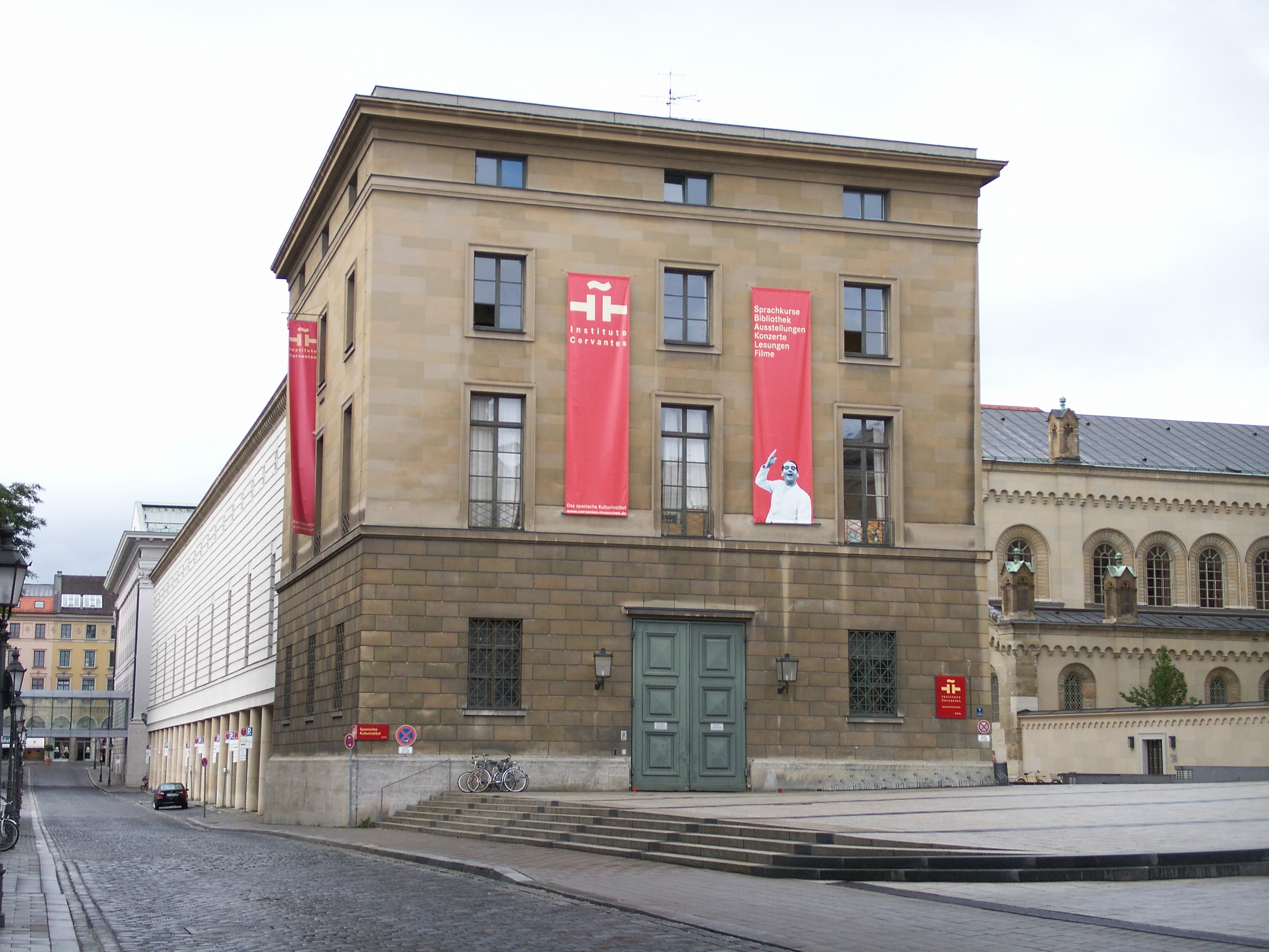 Instituto Cervantes en Munich, Alemania.